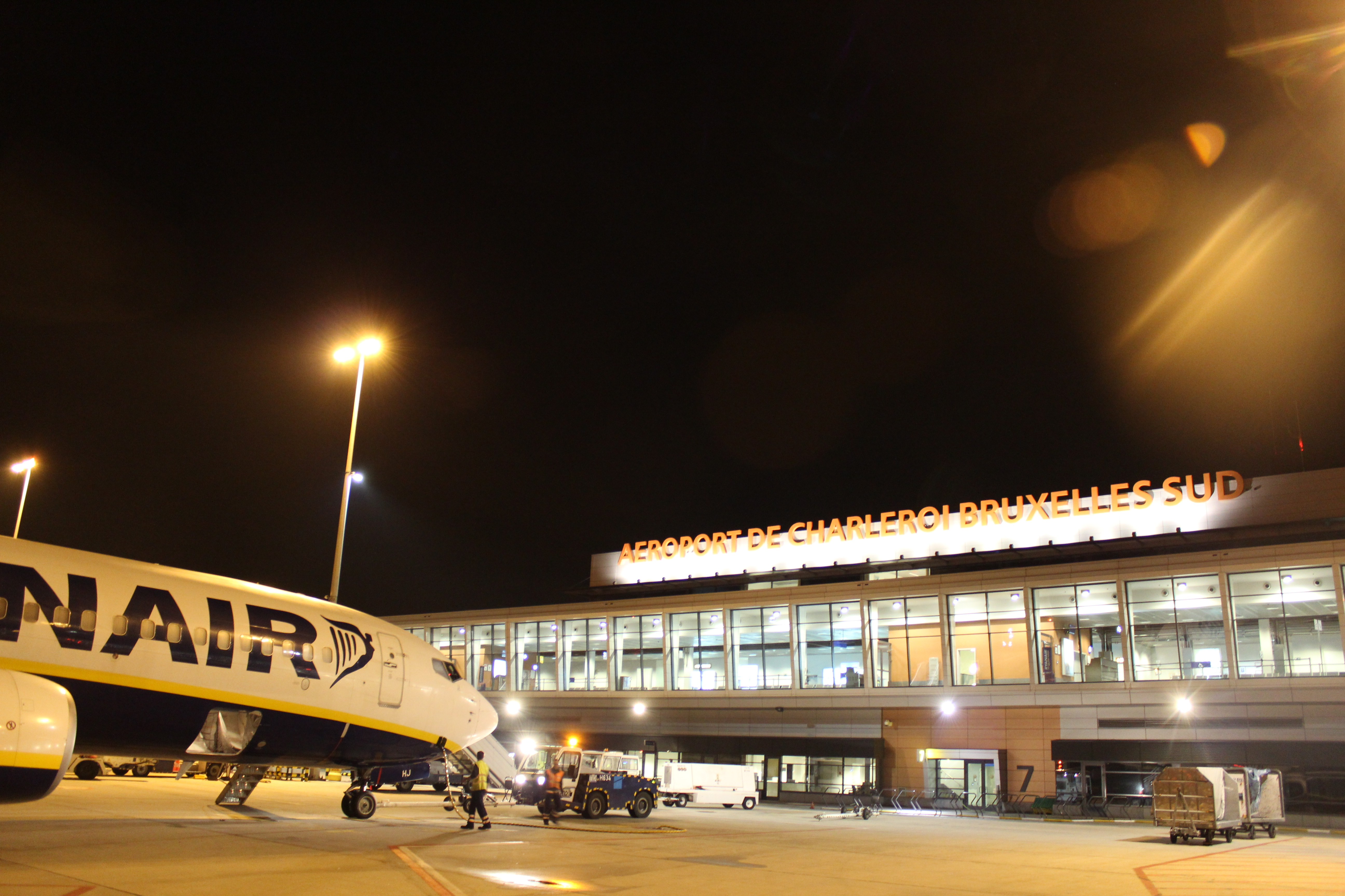 Boieng 737 de la compagnie Ryanair sur le tarmac de l'aéroport de Charleroi en 2011.